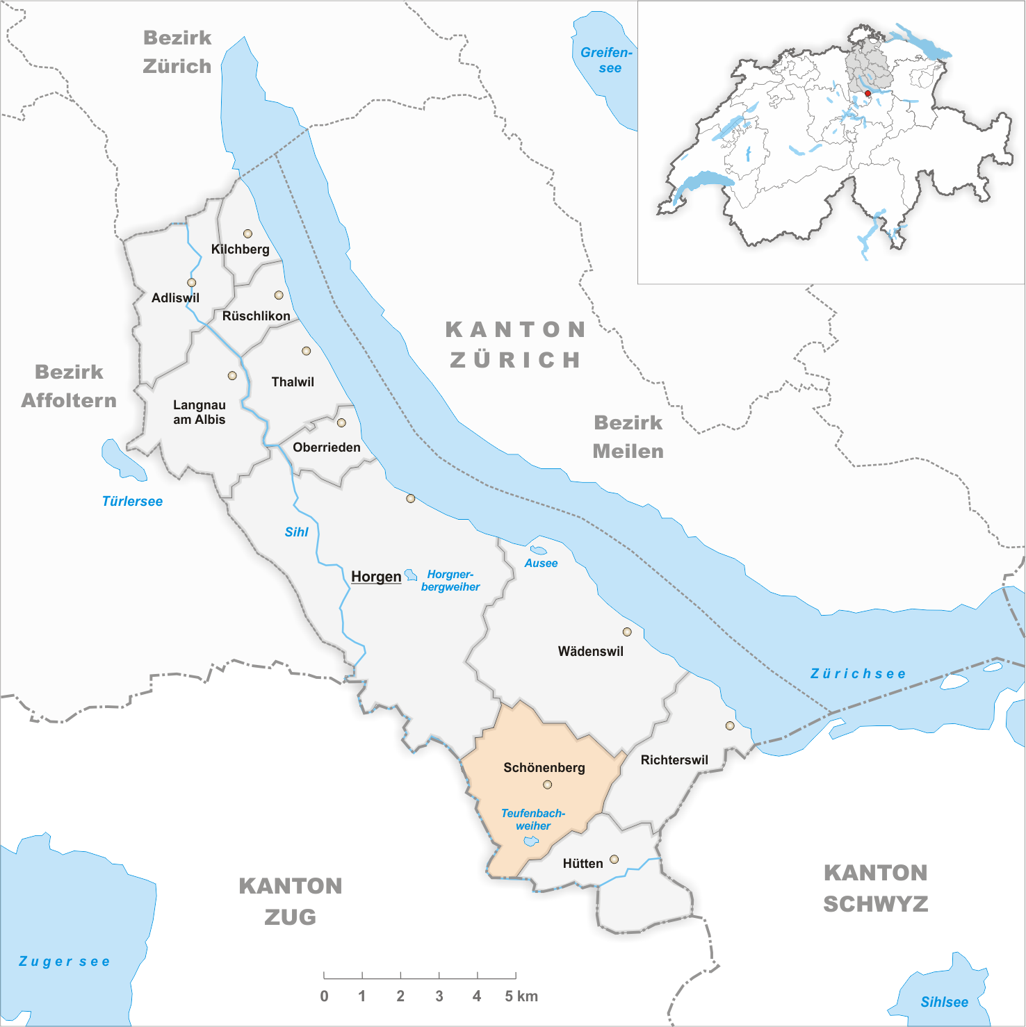 Municipality Schönenberg